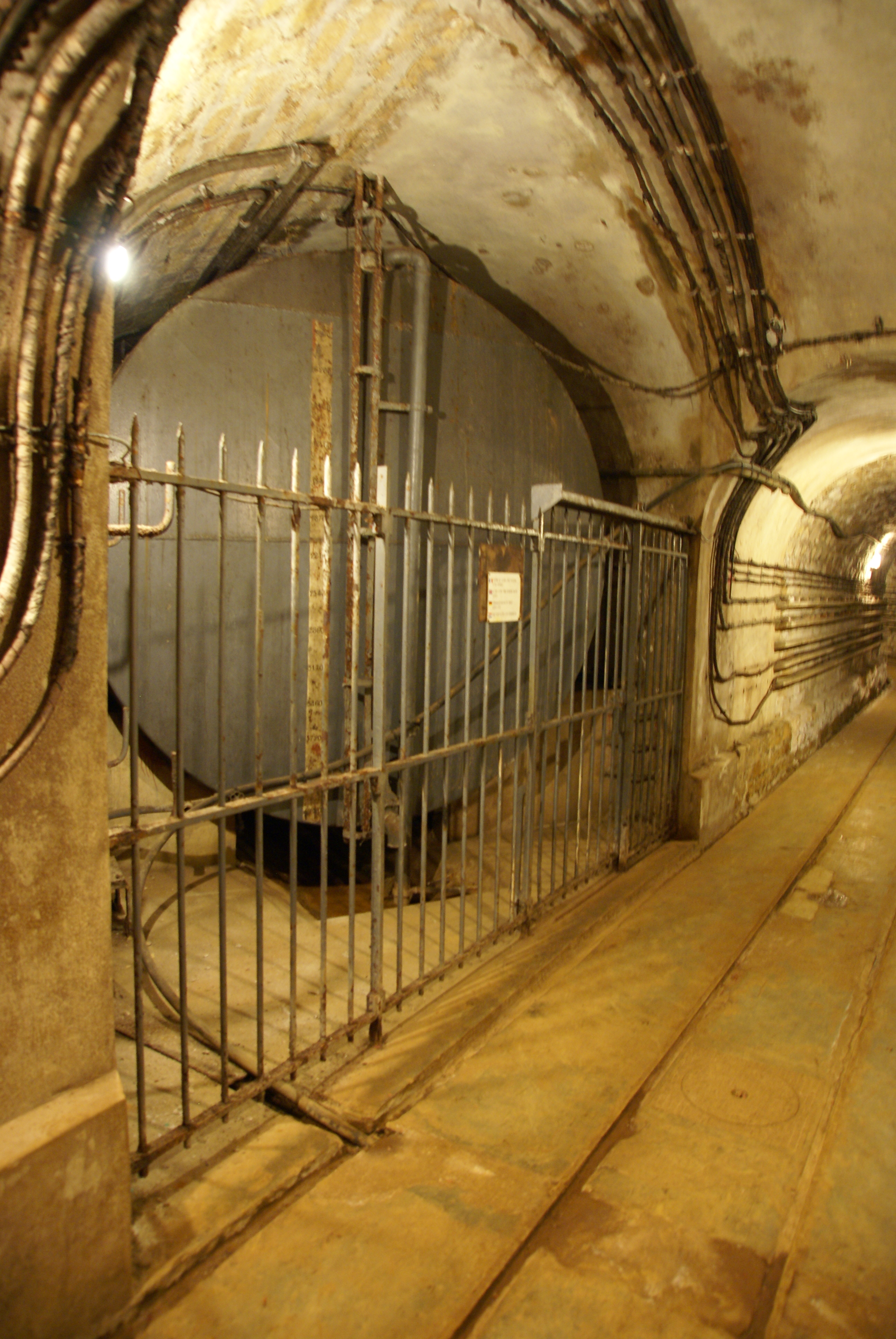 Une des citernes d'eau de l'ouvrage de Fermont (ligne Maginot), près de Longuyon, France.